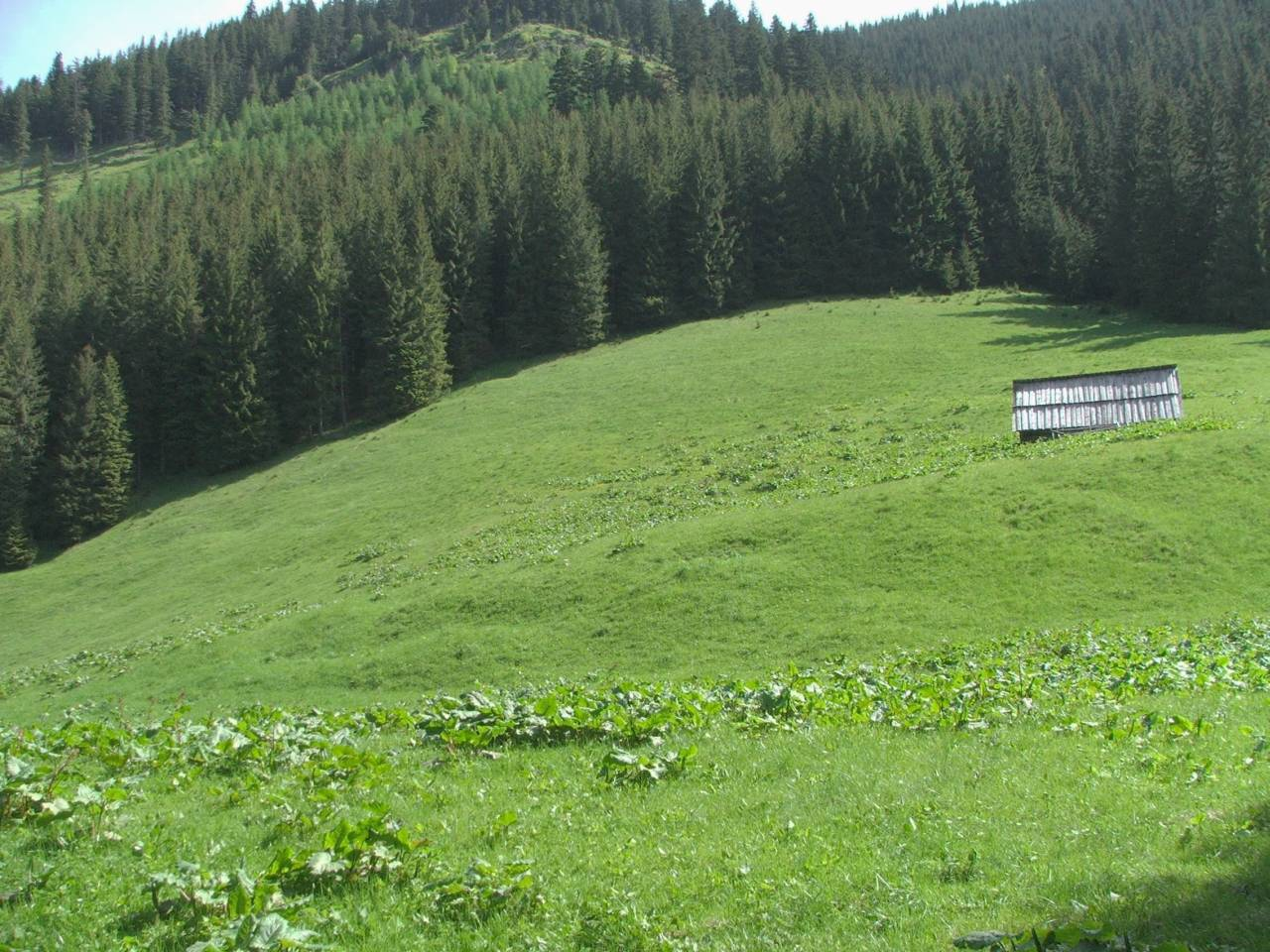 Polana Huty Lejowe w Tatrach, w Dolinie Lejowej